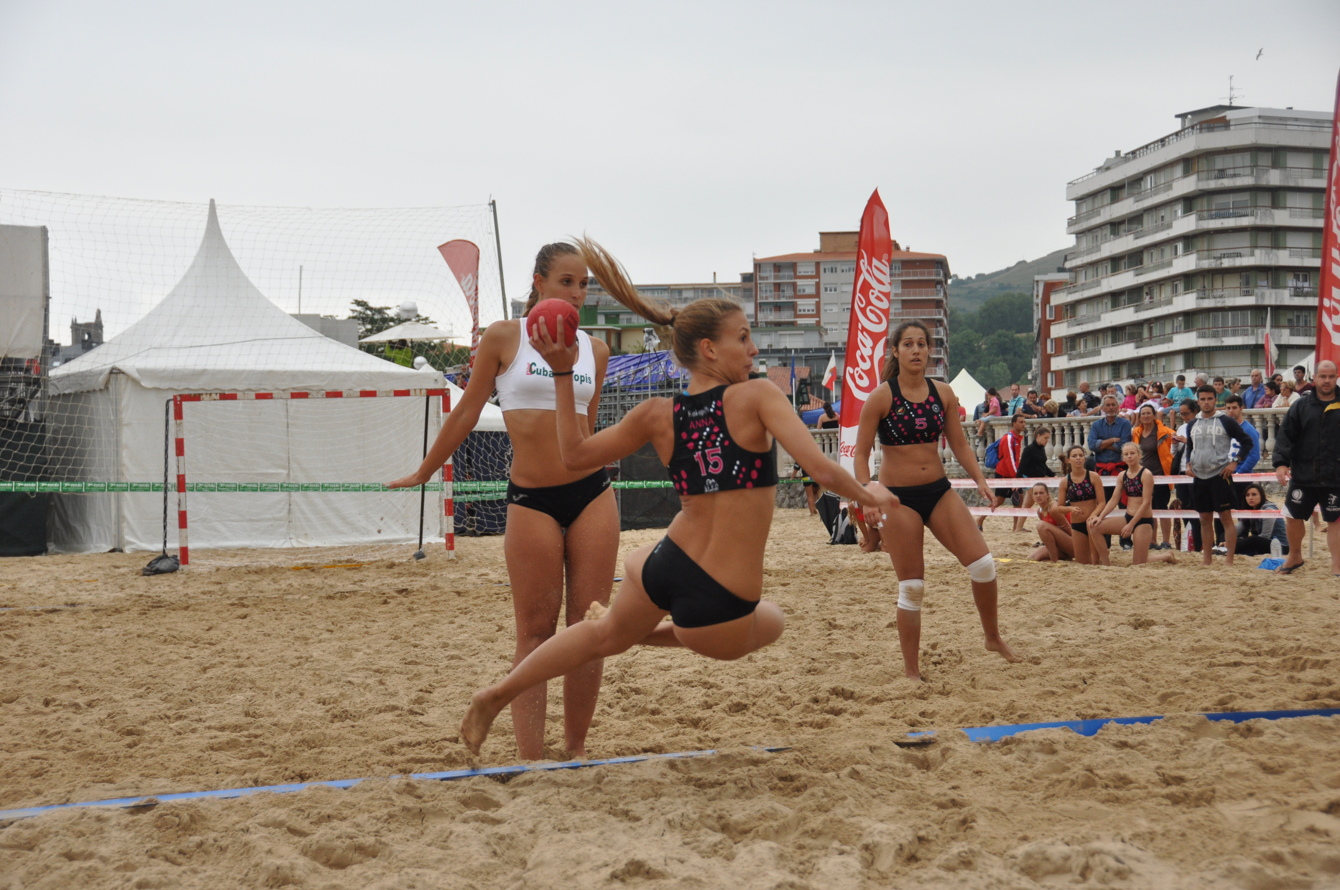 Imágenes del primer día de competición en el Campeonato de España de Balonmano Playa, que se celebra entre el 1 y el 3 de agosto en el municipio cántabro de Laredo.